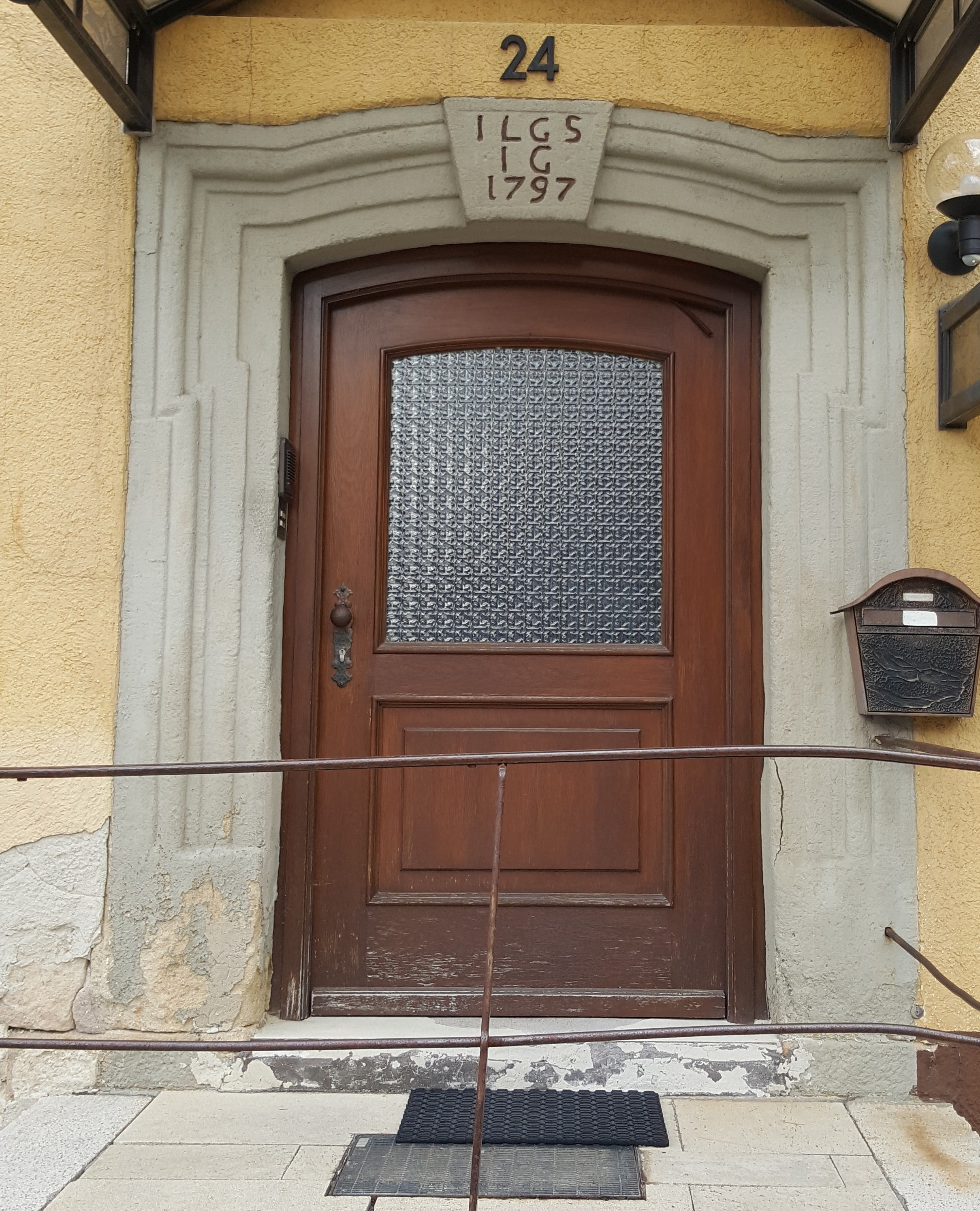 Walddorfhäslach Gustav-Werner-Straße 24 Walddorf Schulhaus II Portal datiert 1797 Johann Ludwig Gaiser Schulmeister Johannes Gaiser